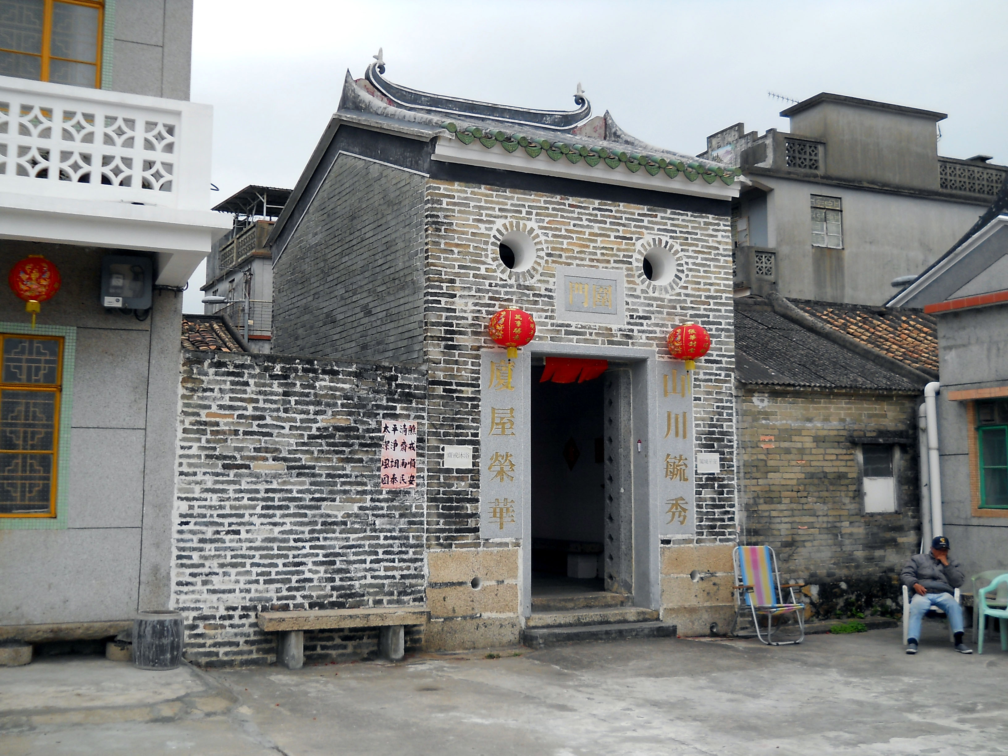 中文（香港）: 山廈村